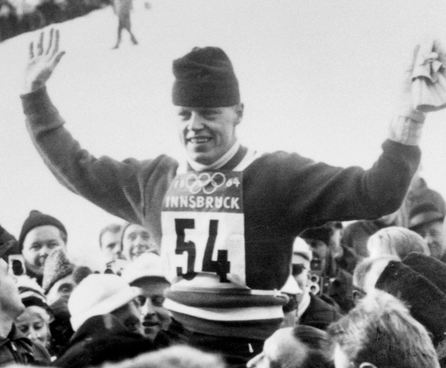 Olympische Winterspelen 1964, de Fin Veikko Kankkonen wint de gouden medaille op de kleine springschans